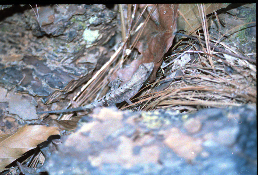 Norops tropidonotus